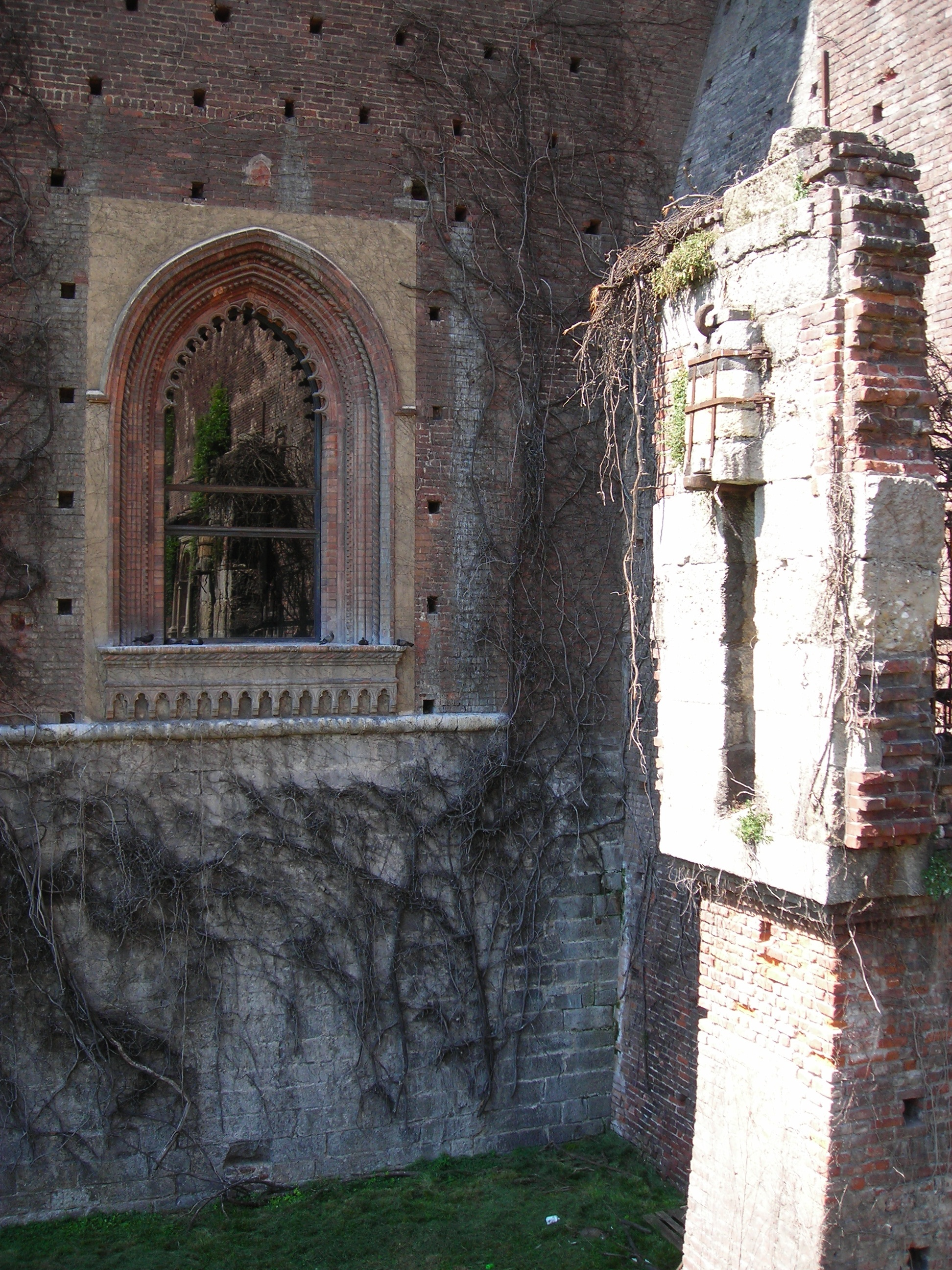 Finestra interna del Castello Sforzesco di Milano